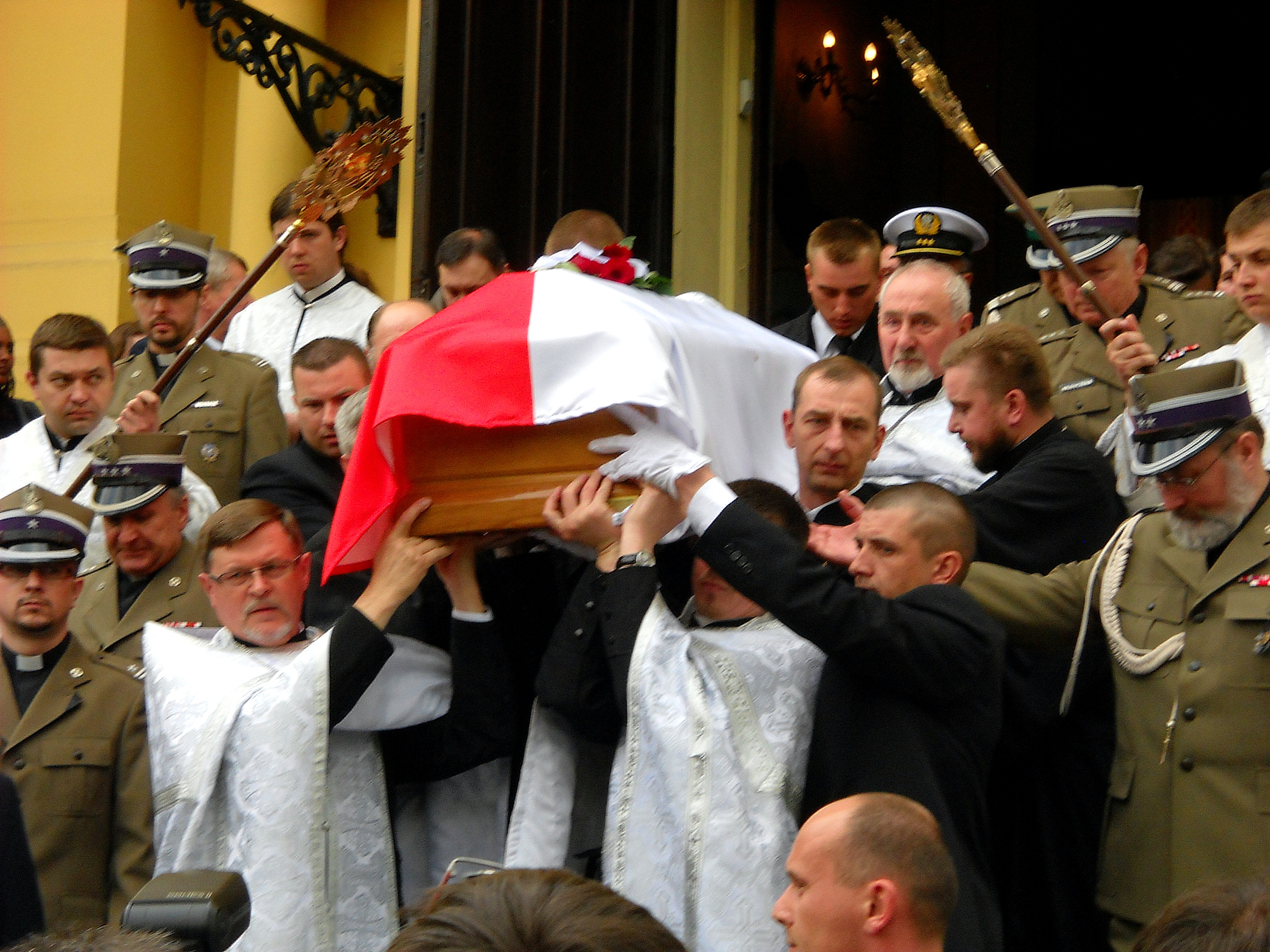 Pogrzeb arcybiskupa Mirona (Chodakowskiego)